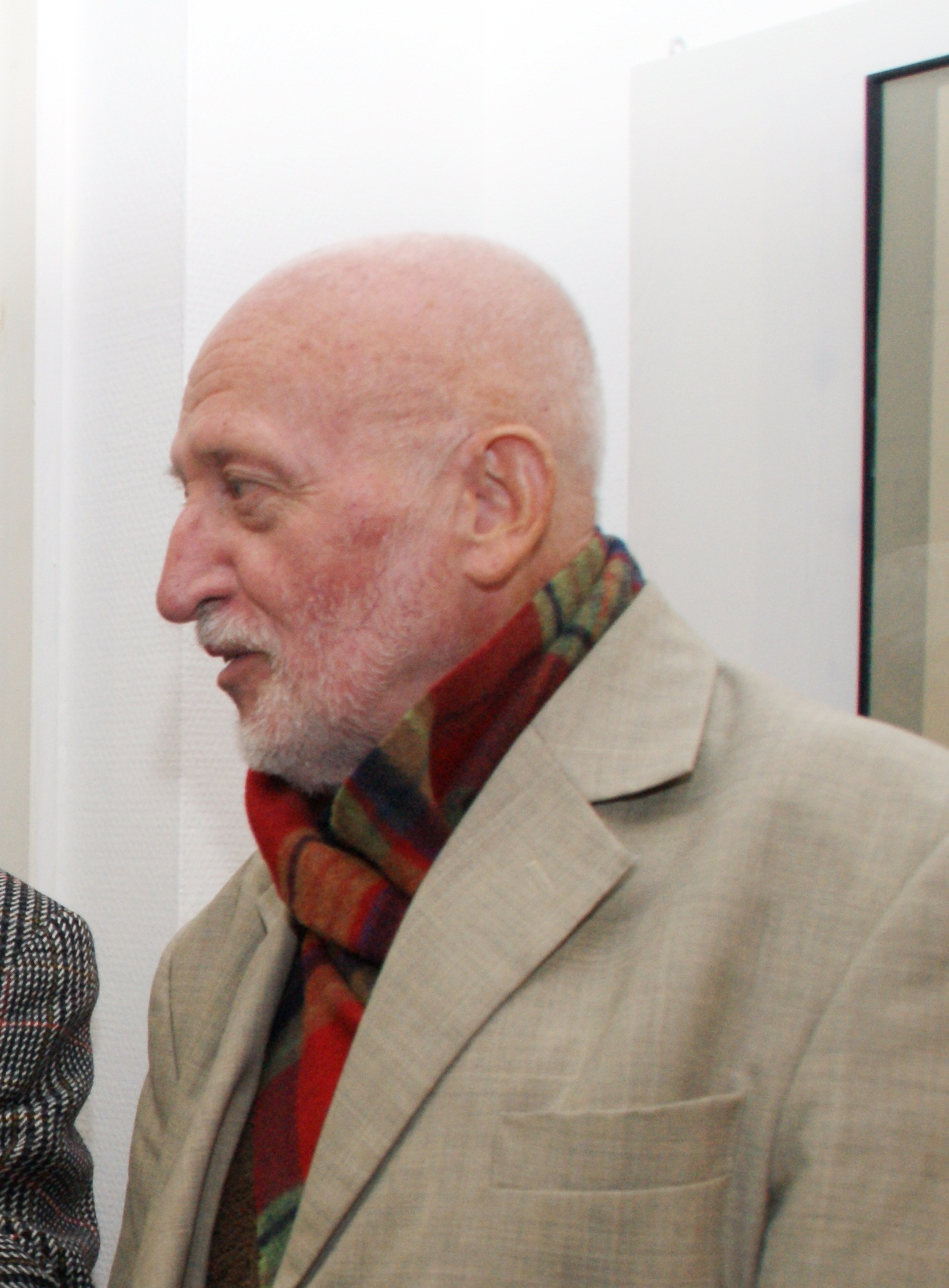 Csete György Budapesten, a HAP Galériában